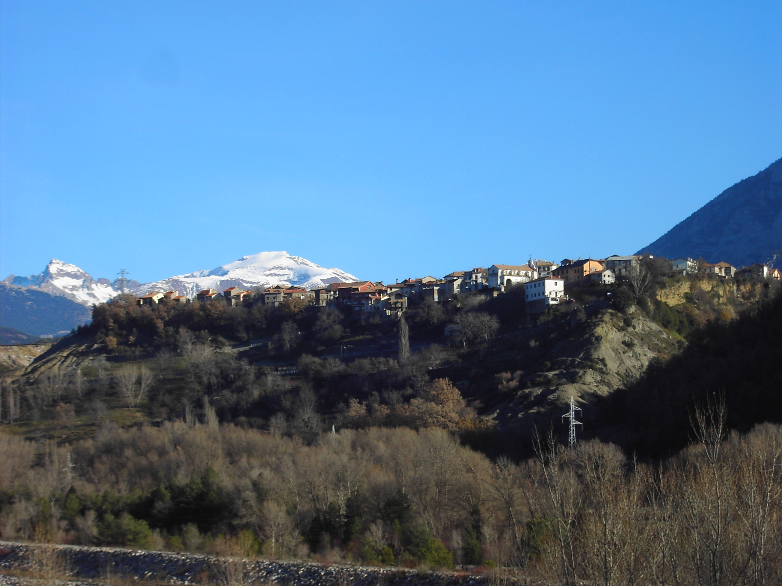 Vista general del núcleo de Laspuña, en la comarca de Sobrarbe, como mirador sobre el Valle del Cinca.